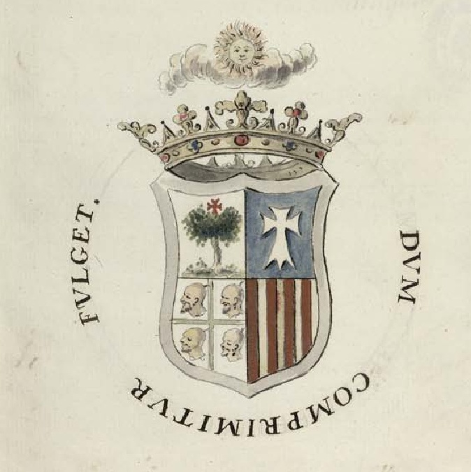 Segunda parte de la Apología del Tratado del Patronato de Calatayud, donde se trata de la antigüedad de la Religión Christiana en Aragón y pureza con que la ha conservado siempre... por el Dr. Miguel Martínez de Villar, asesor de los Comisarios de la Santa Inquisición y Lugarteniente de Baile en Calatayud y su comunidad